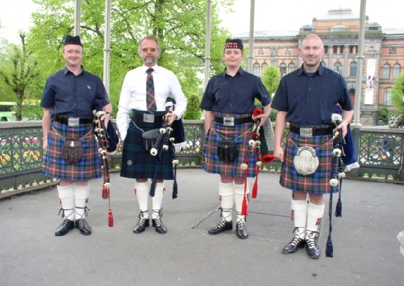 Bergen Pipeband i 2006